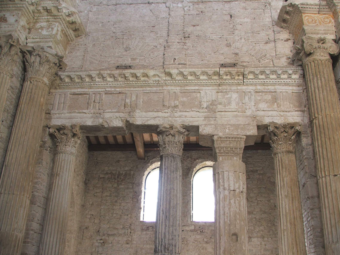 Basilica di San Salvatore (Spoleto)Ldoc